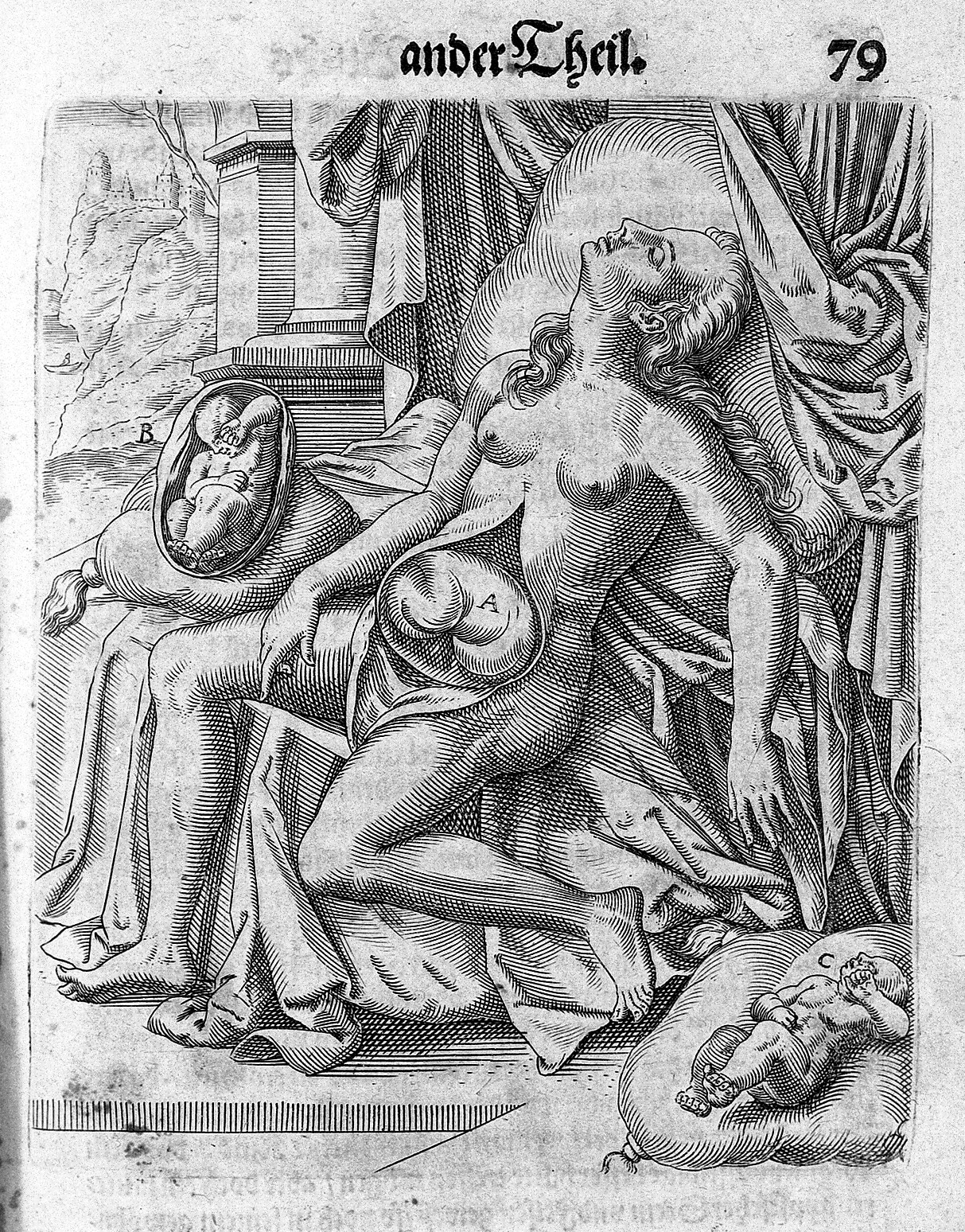 Rare Books Keywords: Obstetrics; Louise Bourgeois